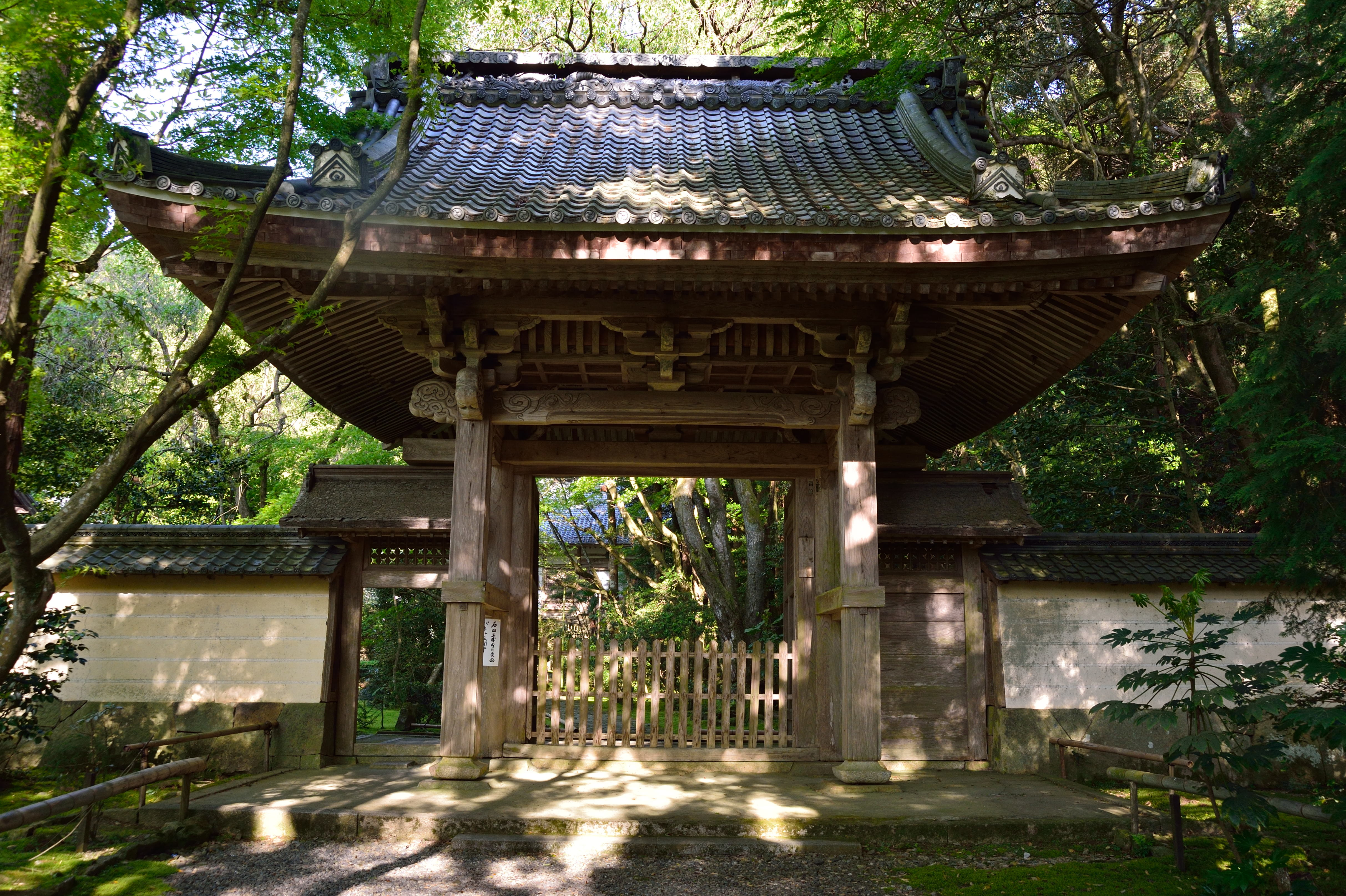 龍潭寺 山門